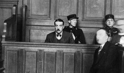 Pierre Bonny dans le box des accusés lors du procès Cotillon (8 au 20 octobre 1935)